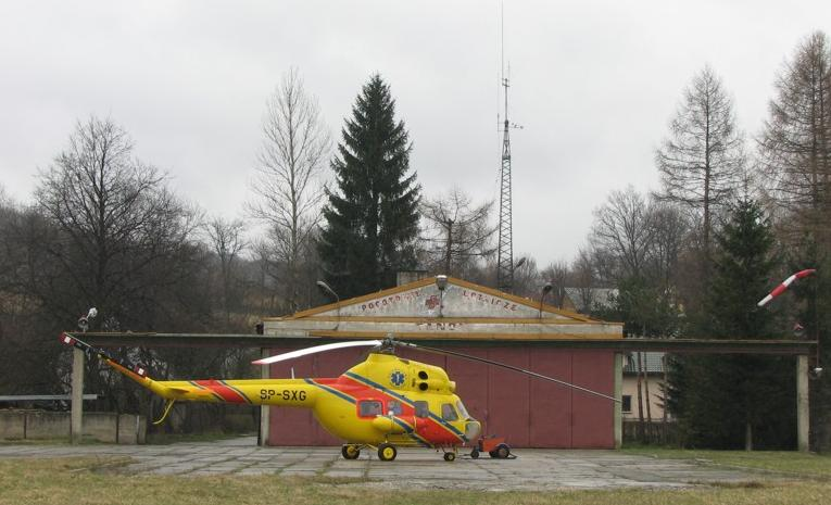 Lądowisko Lotniczego Pogotowia Ratunkowego w Sanoku (SP-SXG)